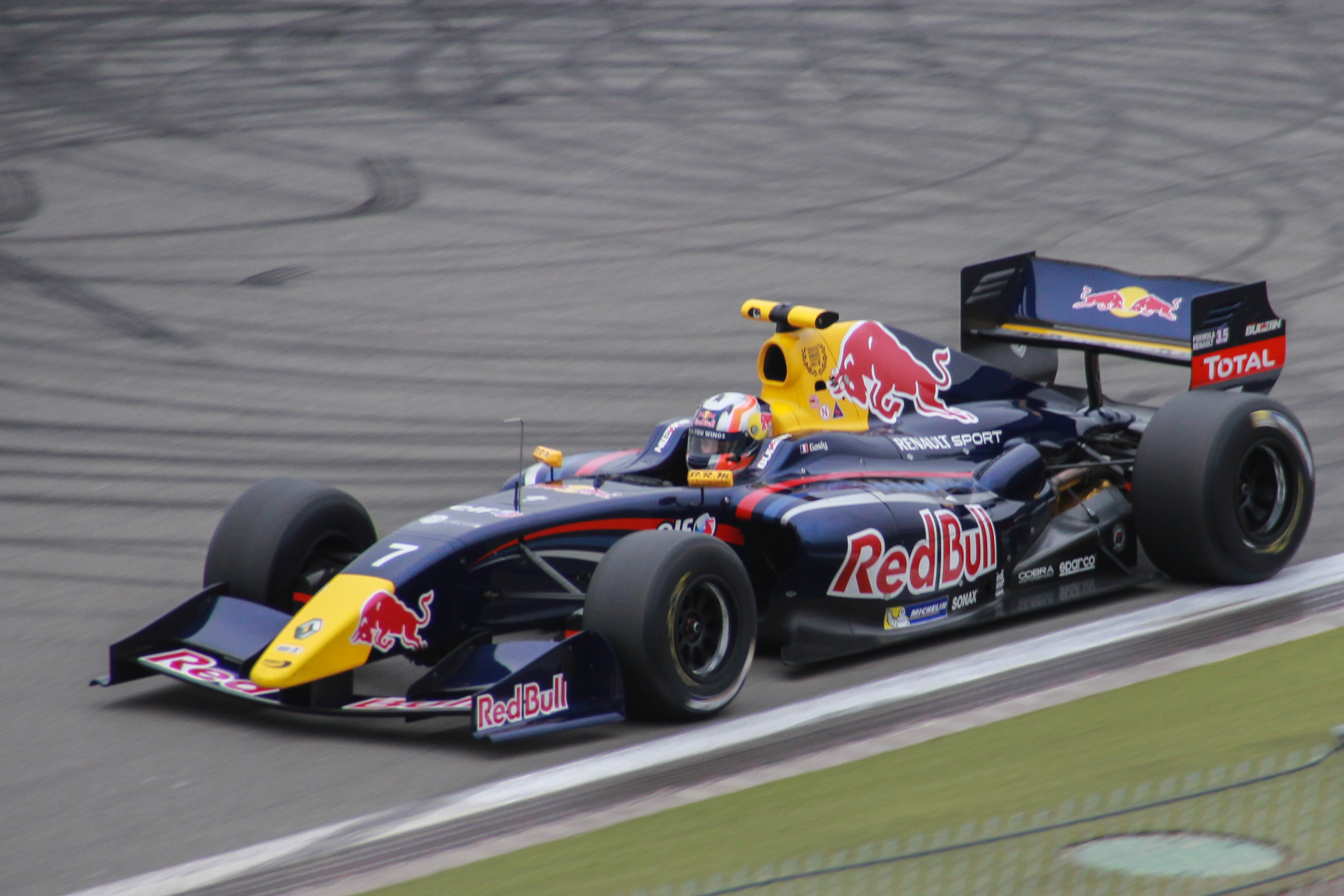 Pierre Gasly beim ersten Rennen der Formel Renault 3.5 auf dem Nürburgring 2014